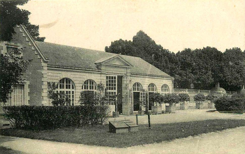 L'orangerie du château, à gauche de la cour d'honneur devant le château. Elle date de la période 1711-1753 et existe toujours.